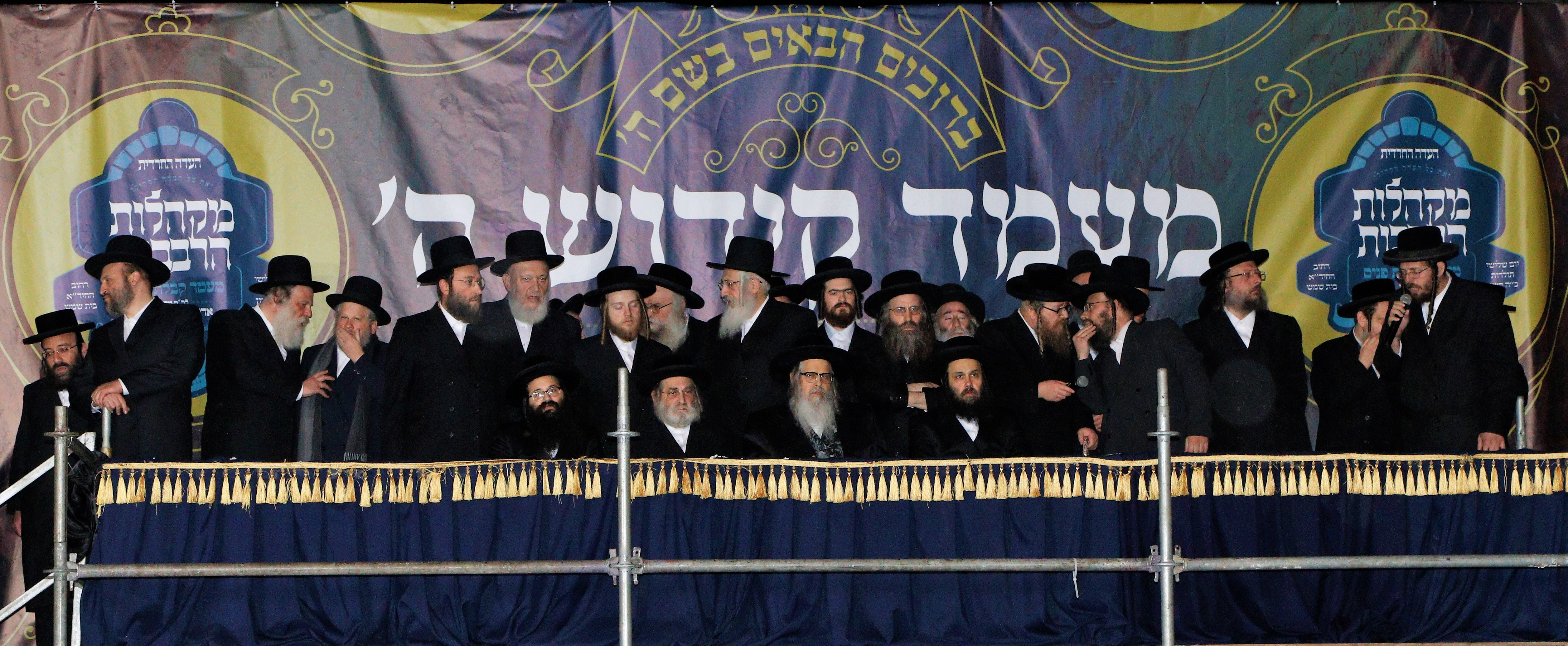 האדמו"ר בעת ביקורו בבית שמש. נובמבר 2019. קרדיט צילום: "רווח הפקות"